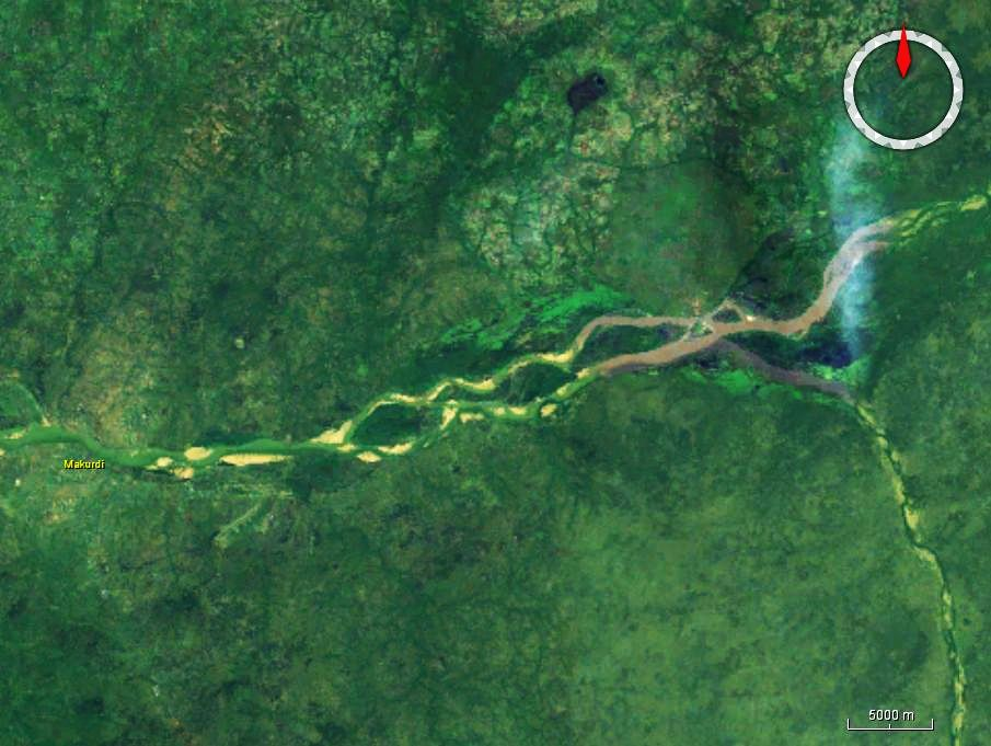 Mündung des Katsina Ala in den Benue